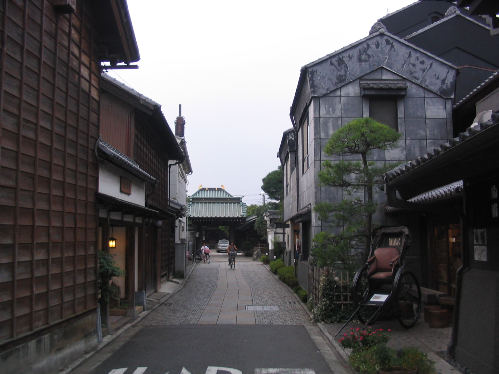 Quiet alley in Kawagoe, Saitama.